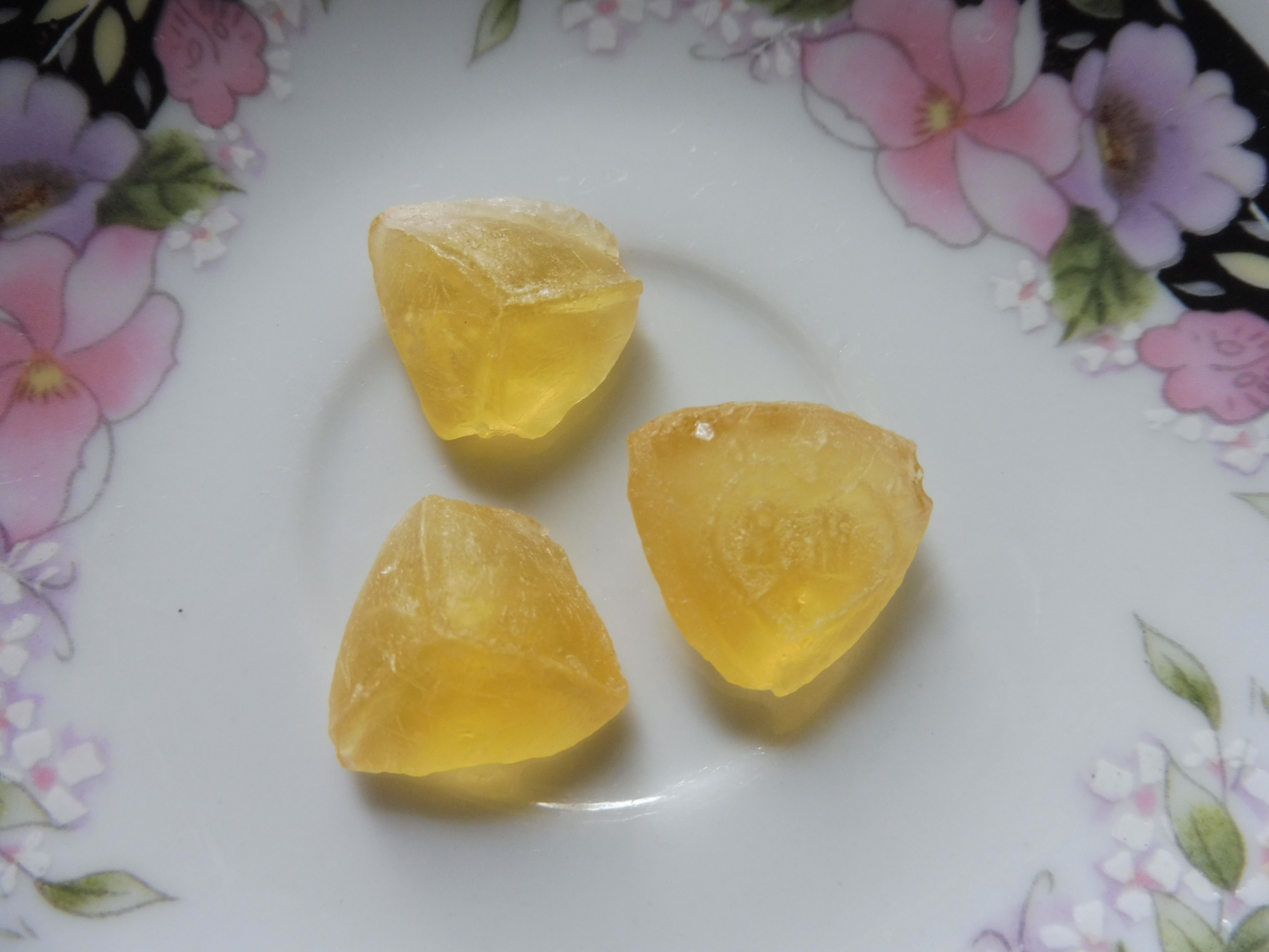 Détail de berlingots de sucre d'orge des religieuses de Moret